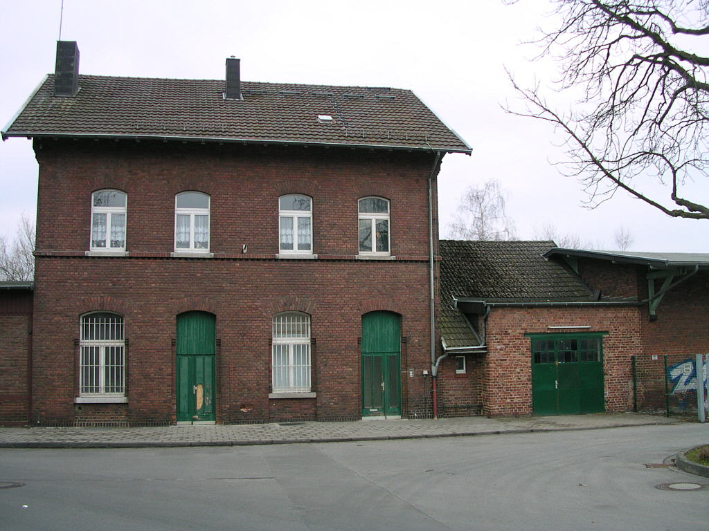 ehemaliger Bahnhof der Vennbahn in Brand (Aachen)